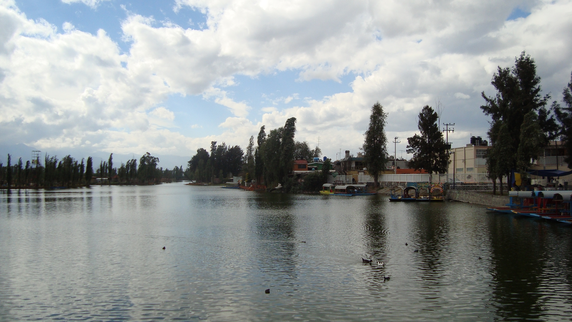 Vista del lago de los Reyes Aztecas desde el malecón sobre la calzada Tláhuac-Tulyehualco, en San Pedro Tláhuac (D. F., México).